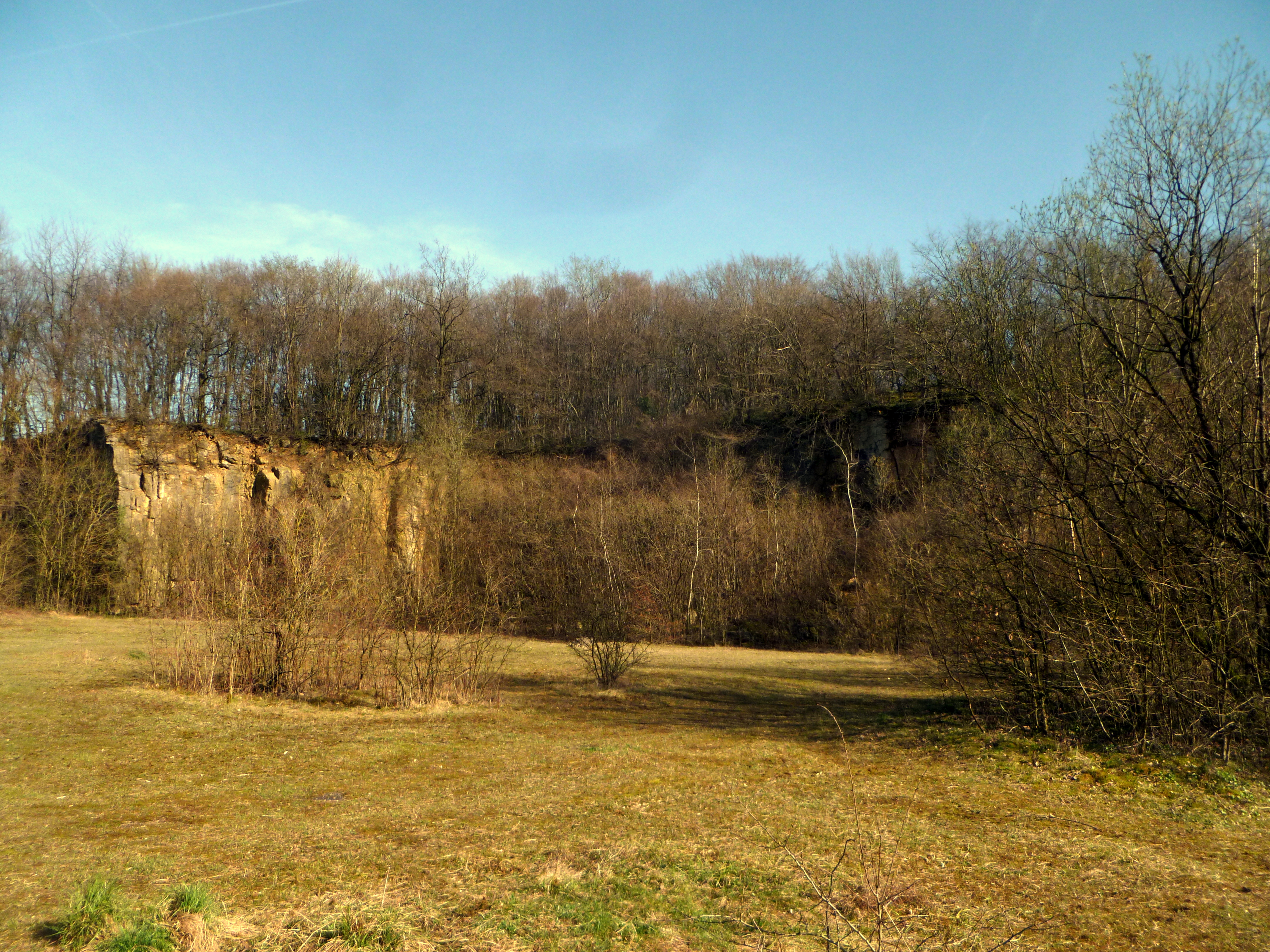 ehemaliger Steinbruch im Naturschutzgebiet Schmithof